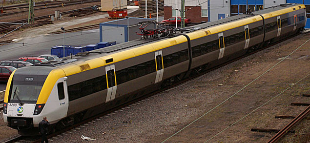 Regina vid servicehallen i Sävenäs. Nov 2007.